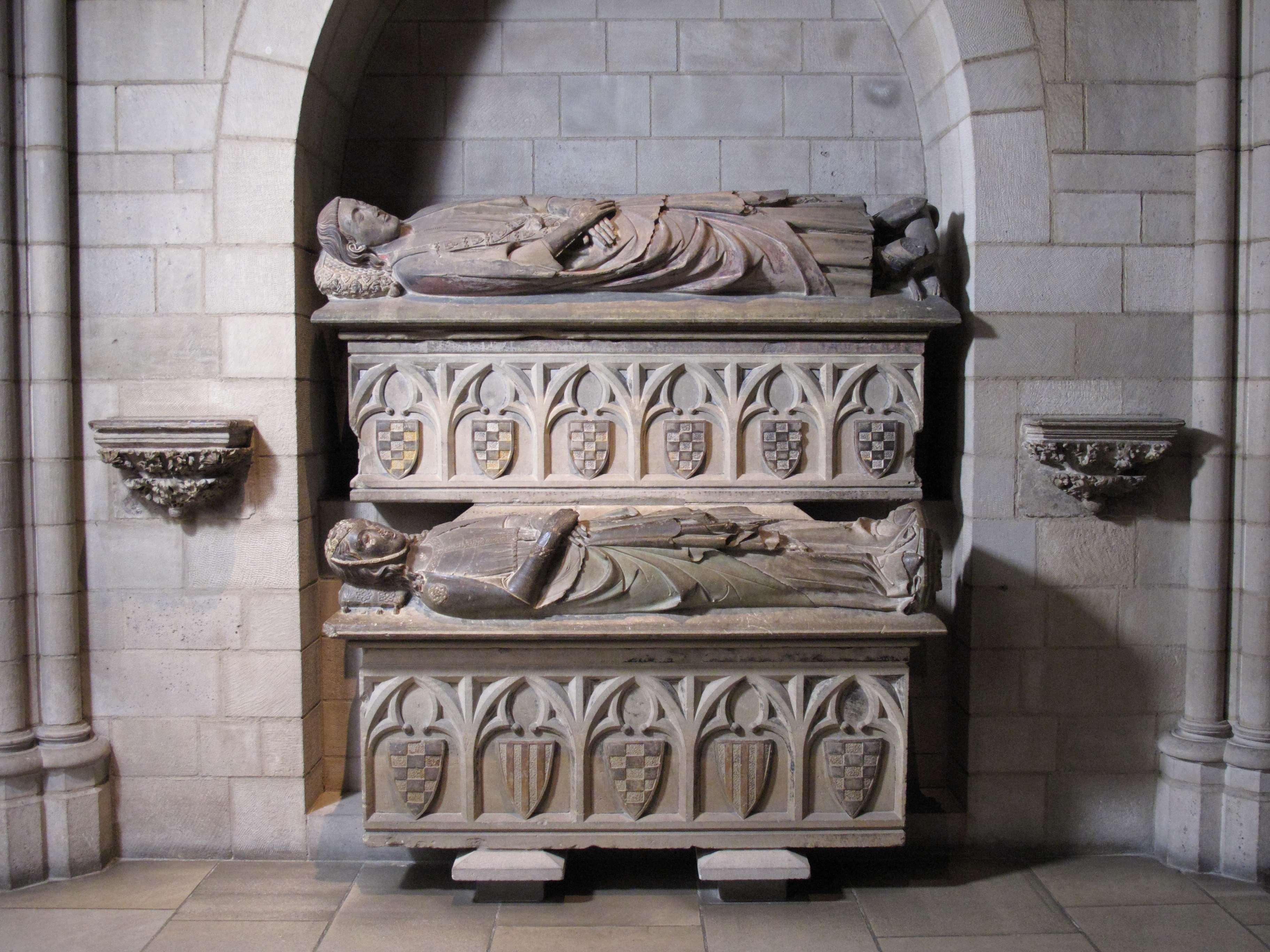 Catalan; Tomb; Sculpture